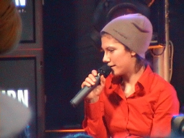 La cantante Elisa Toffoli a SMAU 2004, Milano